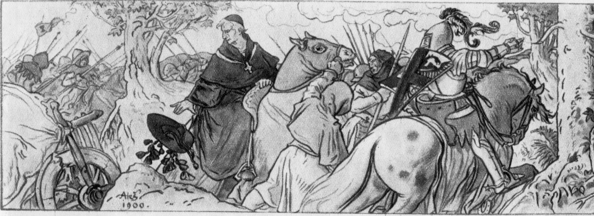 U Domažlic